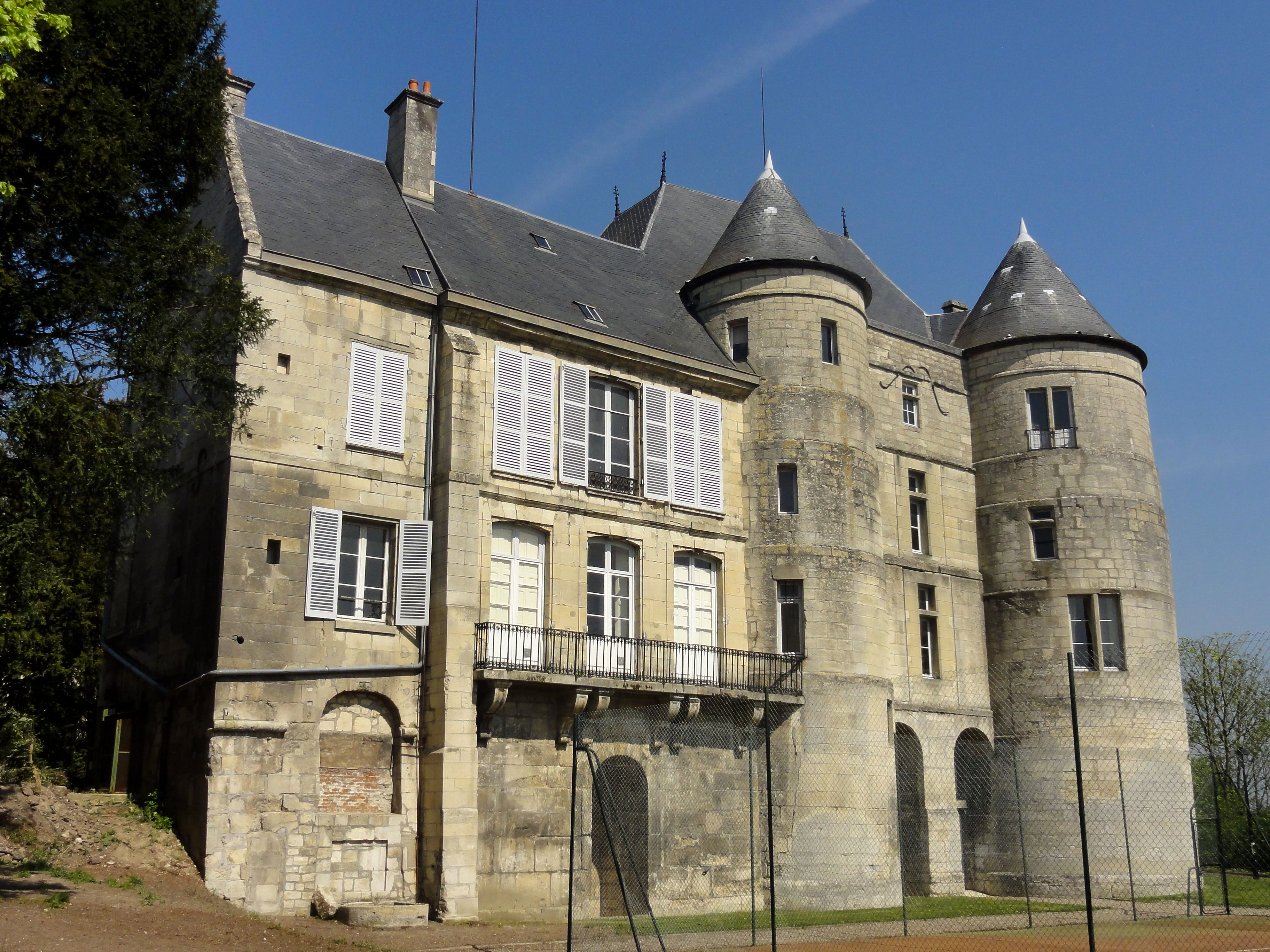 Vue depuis le sud-ouest.